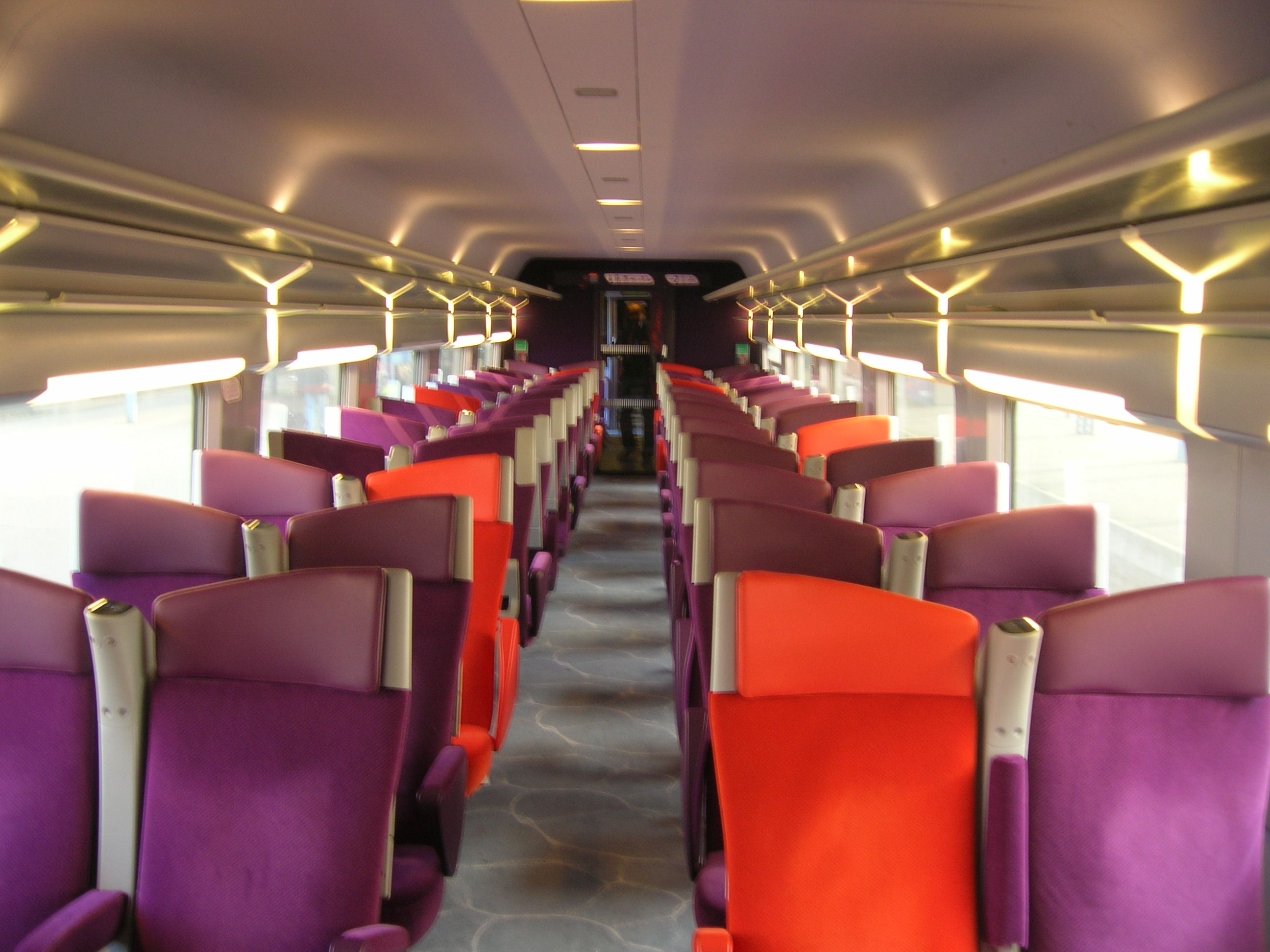 TGV Lacroix, intérieur 2e classe